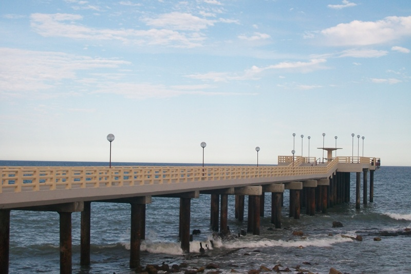 MIRAMAR Muelle de Pescadores (2012)